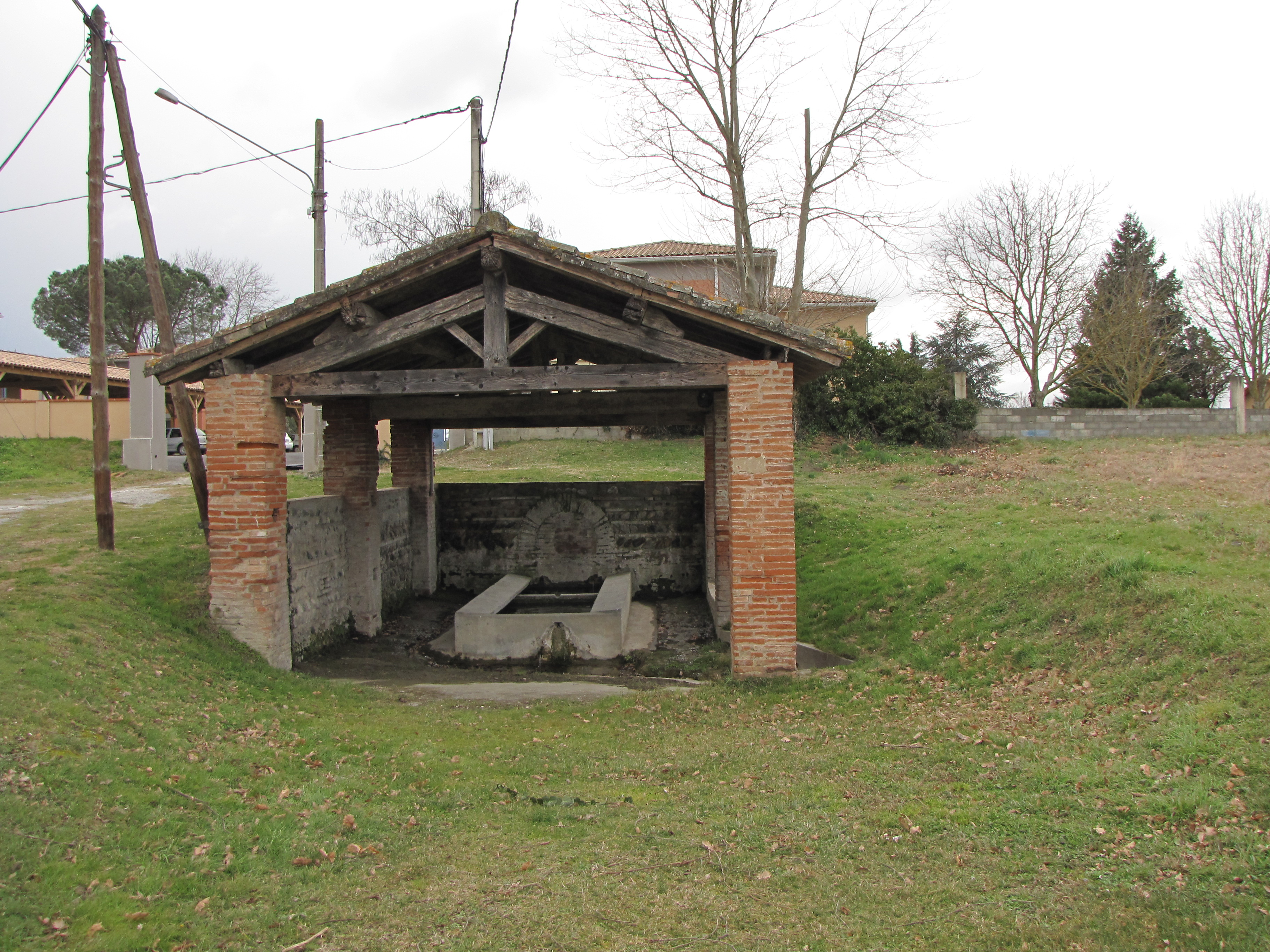 Ancien lavoir du Fauga